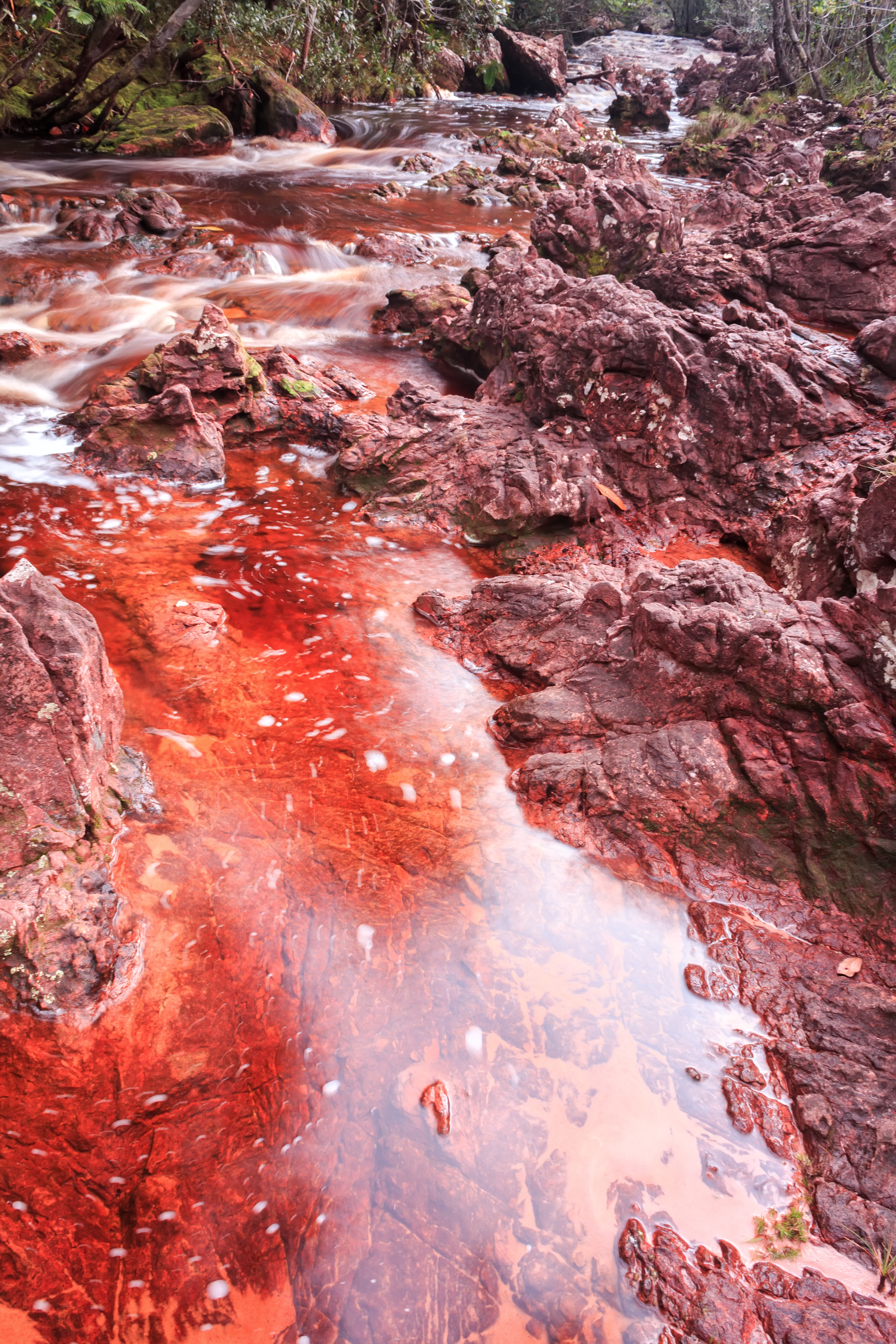 Zorro River | Caño Zorro